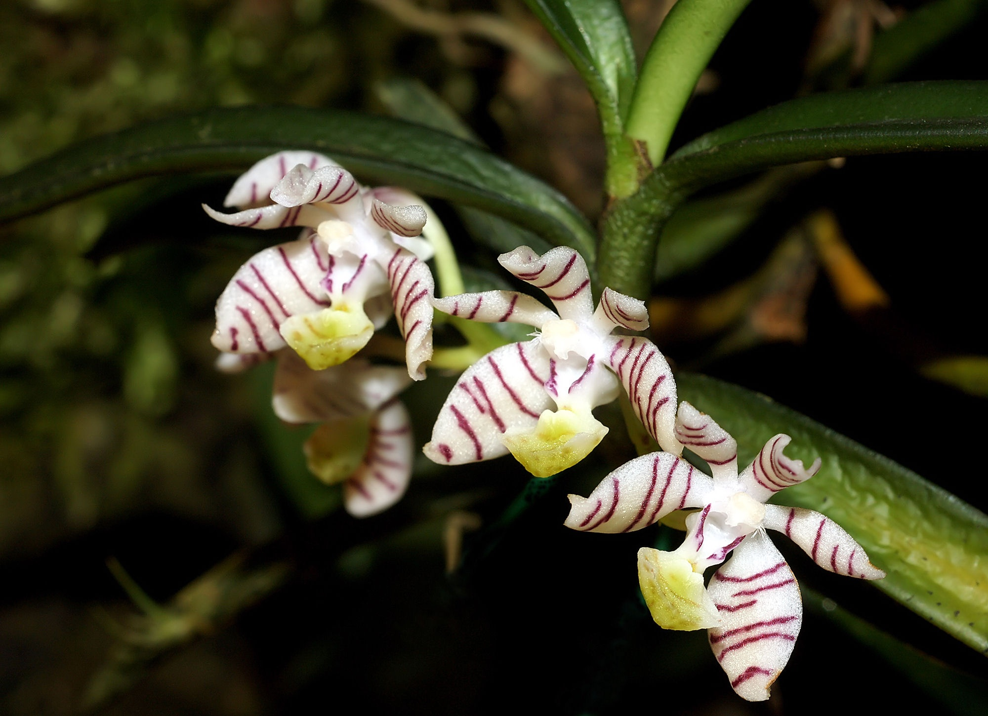 Trichoglottis pusilla